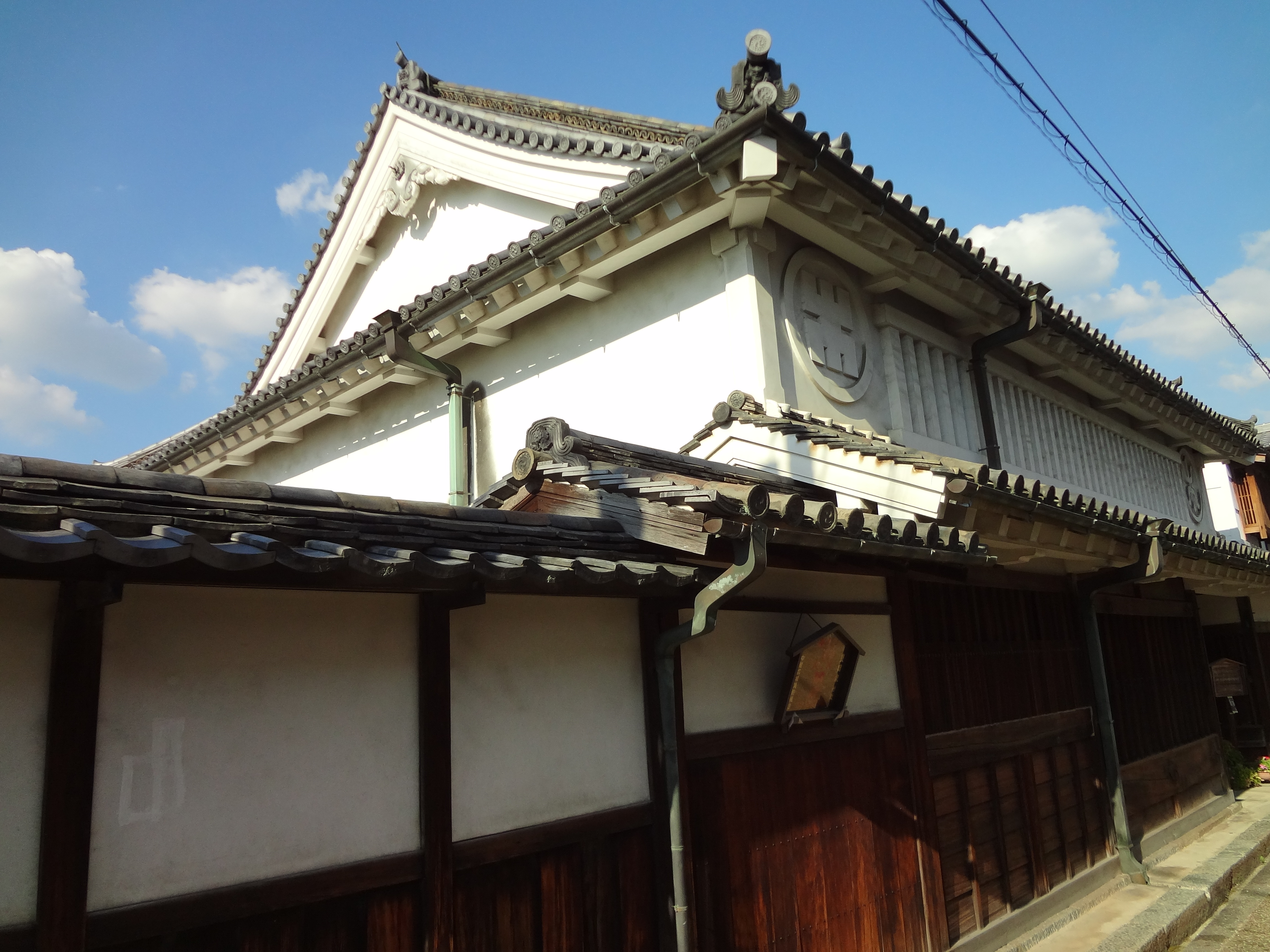 旧牧村家住宅ー西の木屋